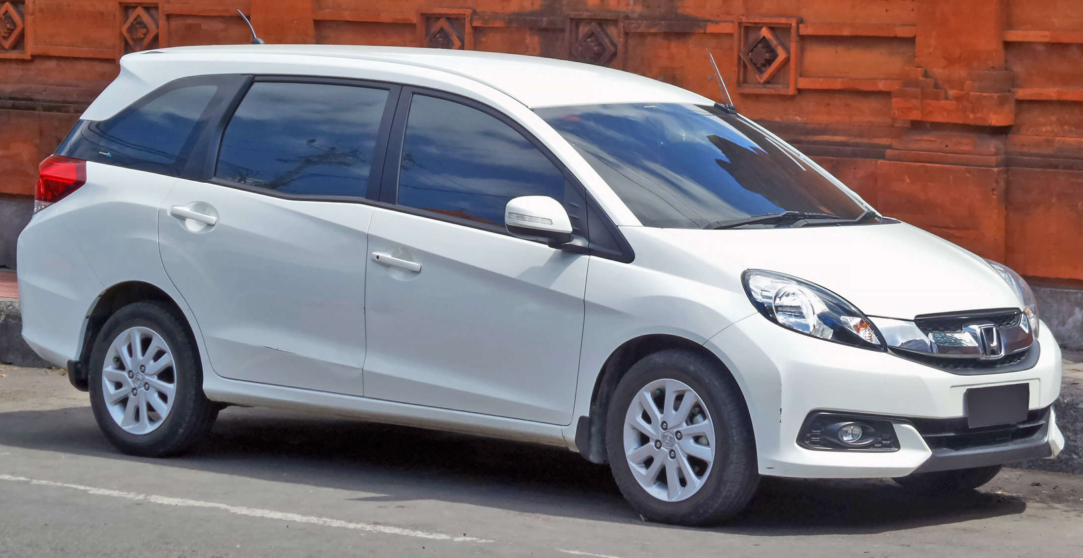 The 'de facto' second-generation Honda Mobilio, based from Honda Brio. Honda Mobilio 'generasi kedua' yang memakai platform yang sama dengan Brio.